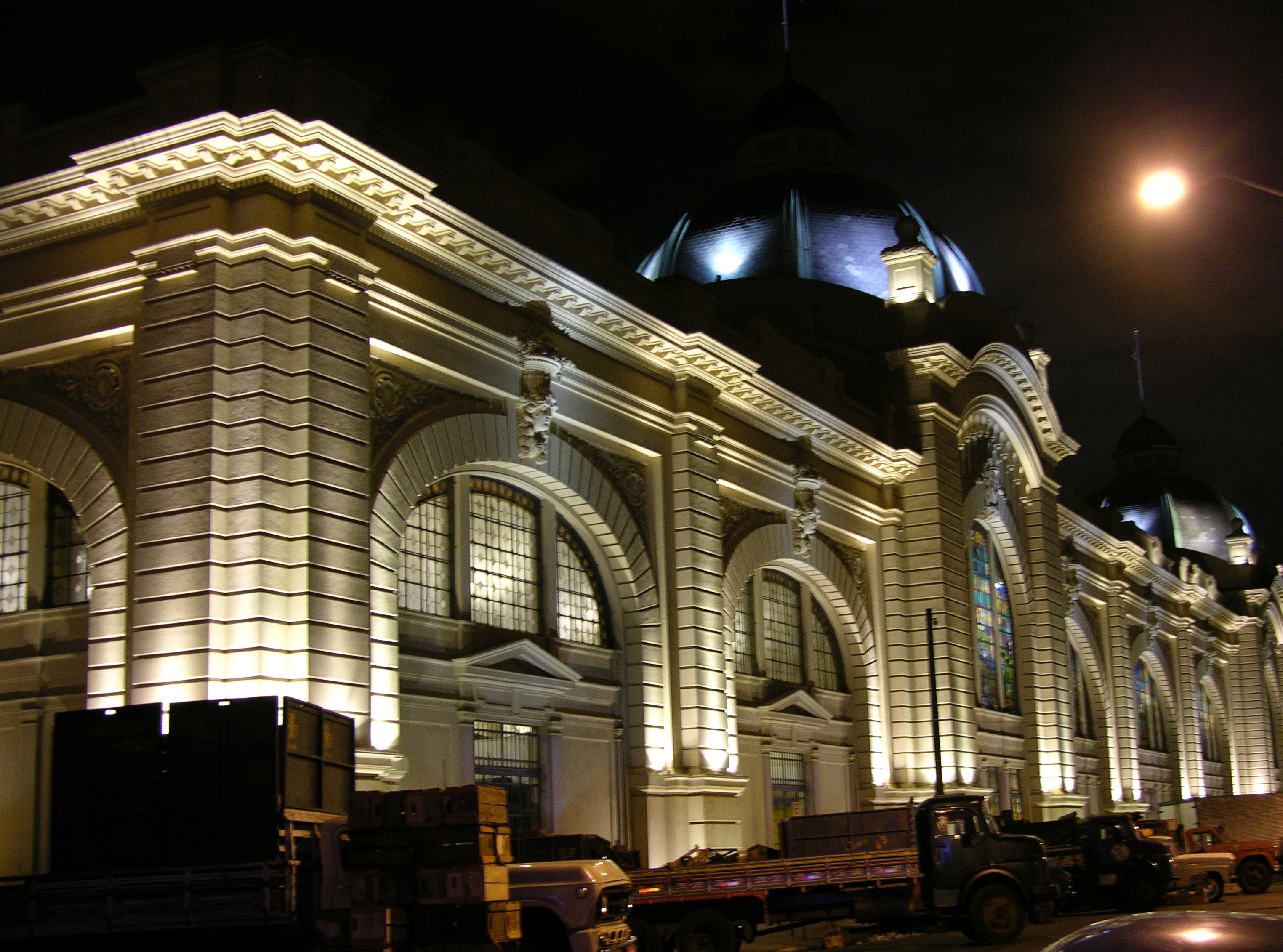 Mercado Municipal de São Paulo, Brasil.